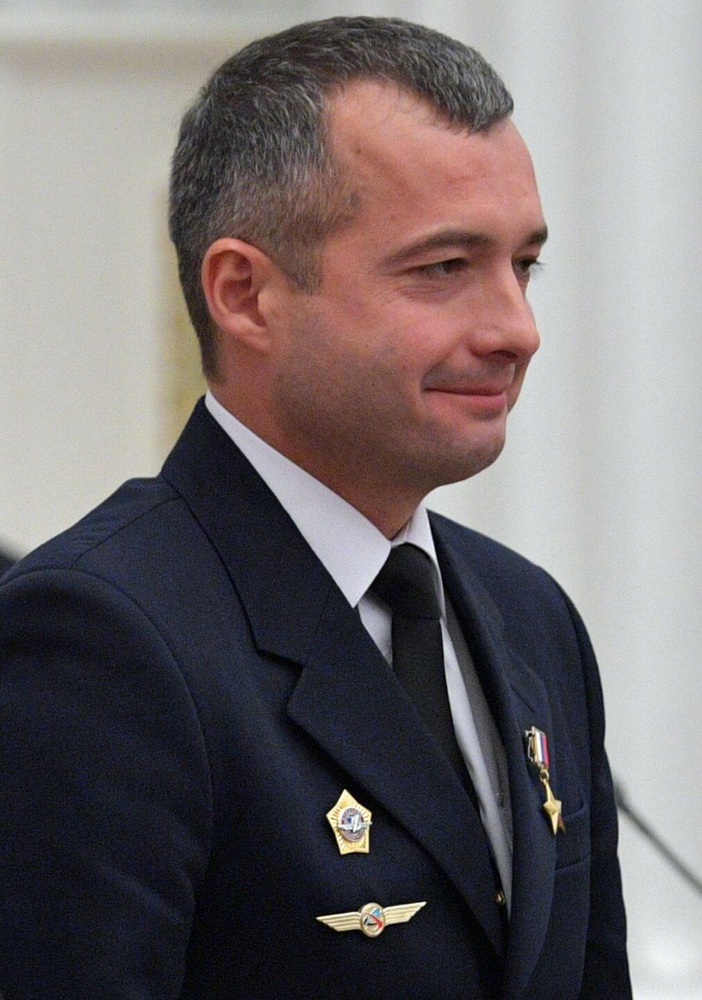 Герой Российской Федерации Дамир Касимович Юсупов